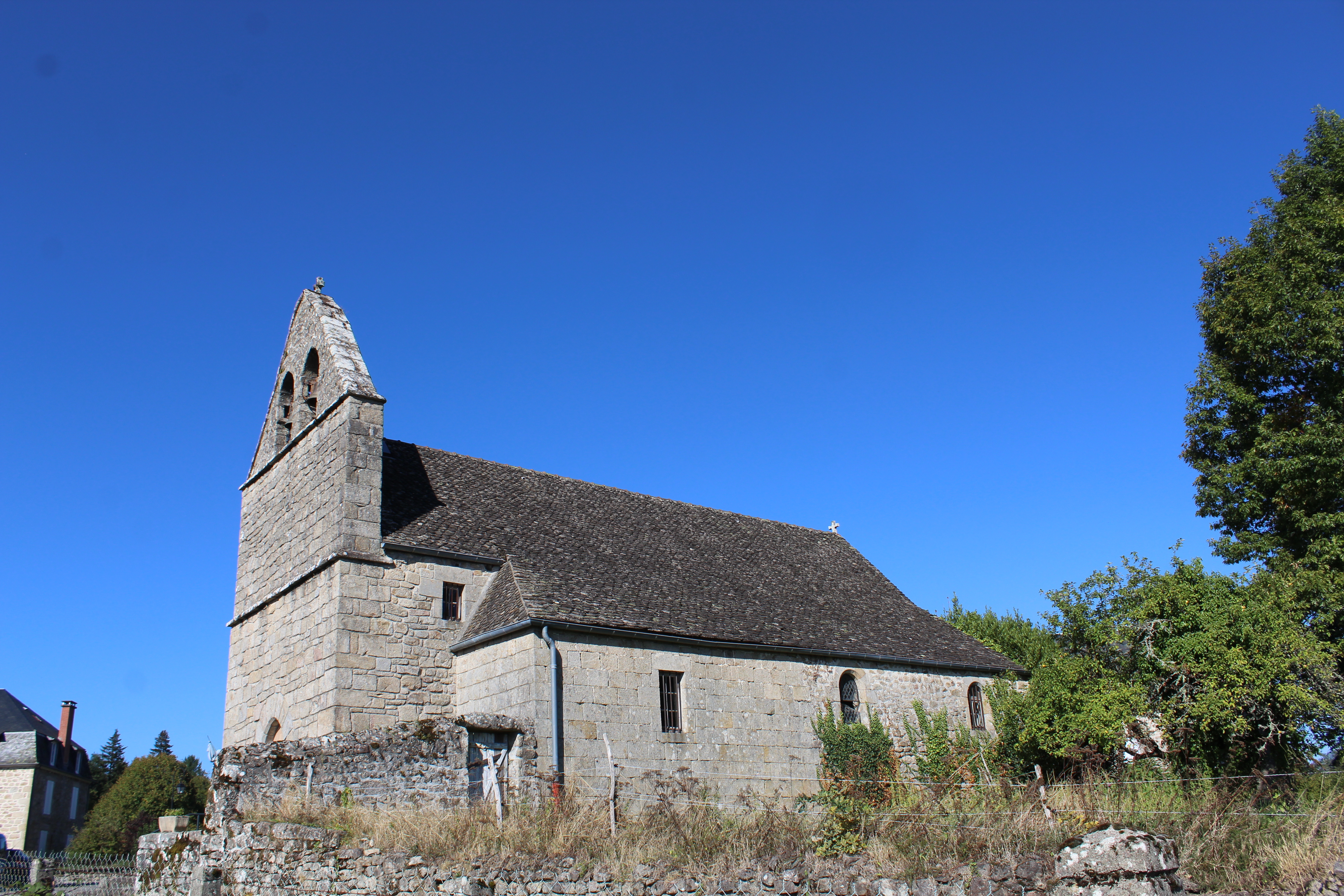 L'église.